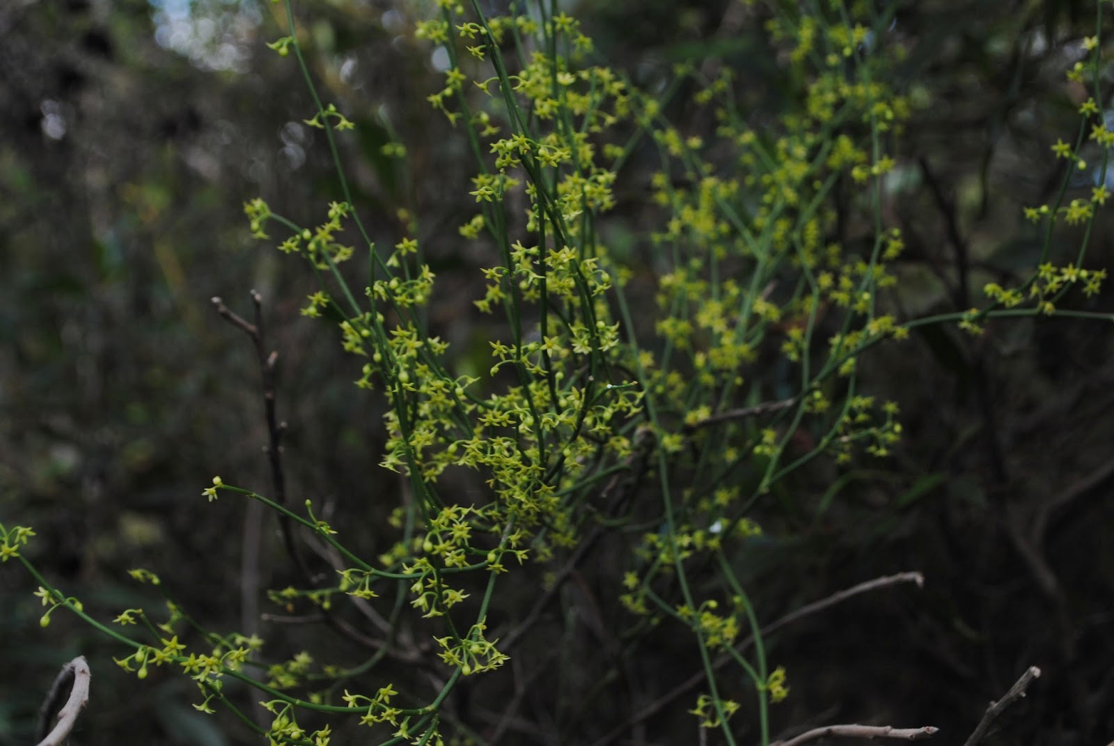 Orthosia scoparia. Apocynaceae. Fotos tomadas sobre árboles y arbustos al margen del Arroyo Yerbal Chico en la Quebrada de los Cuervos, departamento de Treinta y Tres, Uruguay.